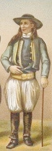 Costume véritable type du Cornouaillais : petit chapeau, veste courte, deux gilets, l'un croisé, l'autre ouvert et garni de nombreux boutons. Gouriz de cuir à boucles. Braies de grosse toile plissées. Guêtres et souliers de cuir. Pen-bas" (bâton de racine de chêne).